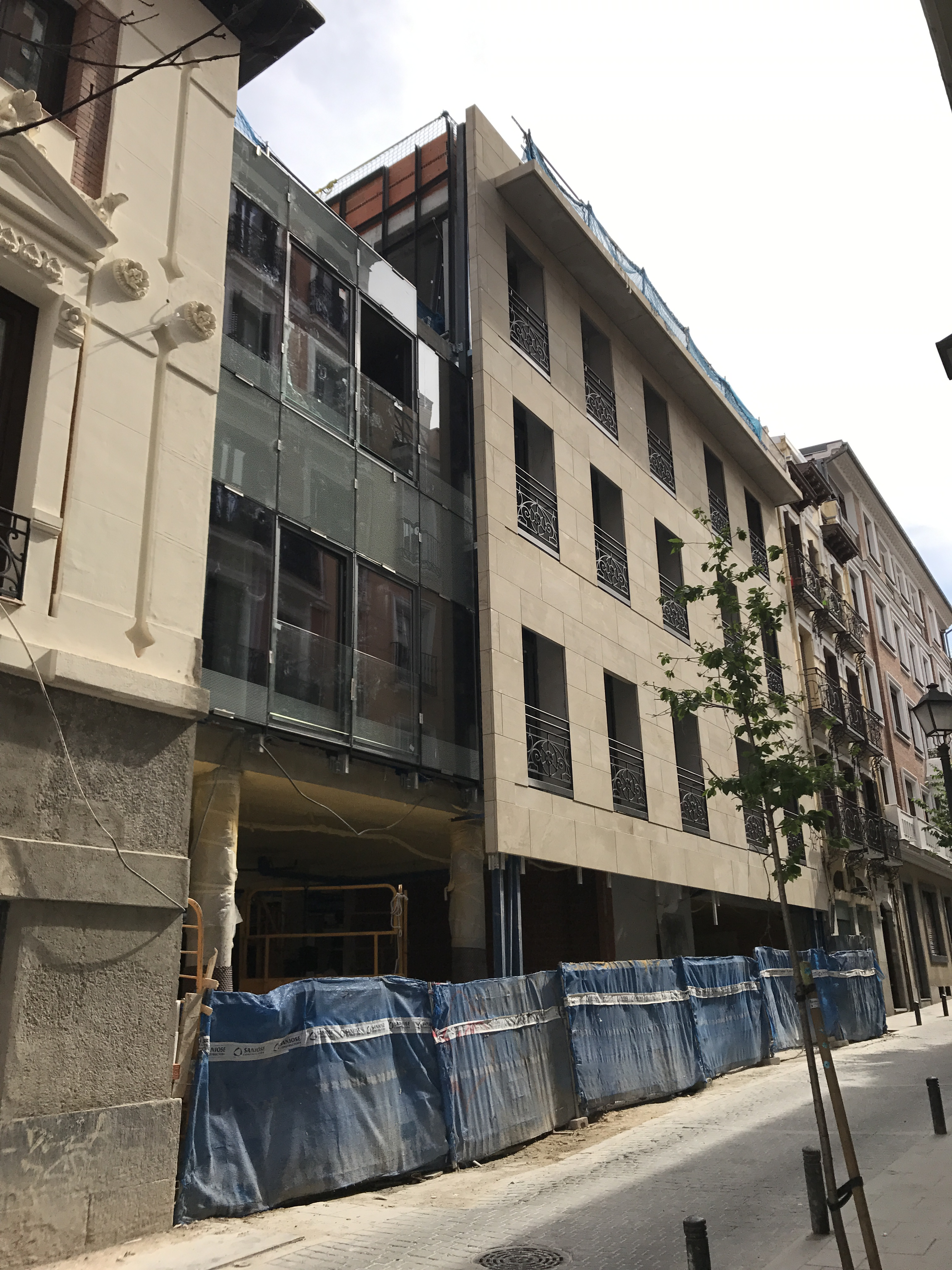 Lateral del Edificio Lamarca Hermanos, que da a la calle de Regueros